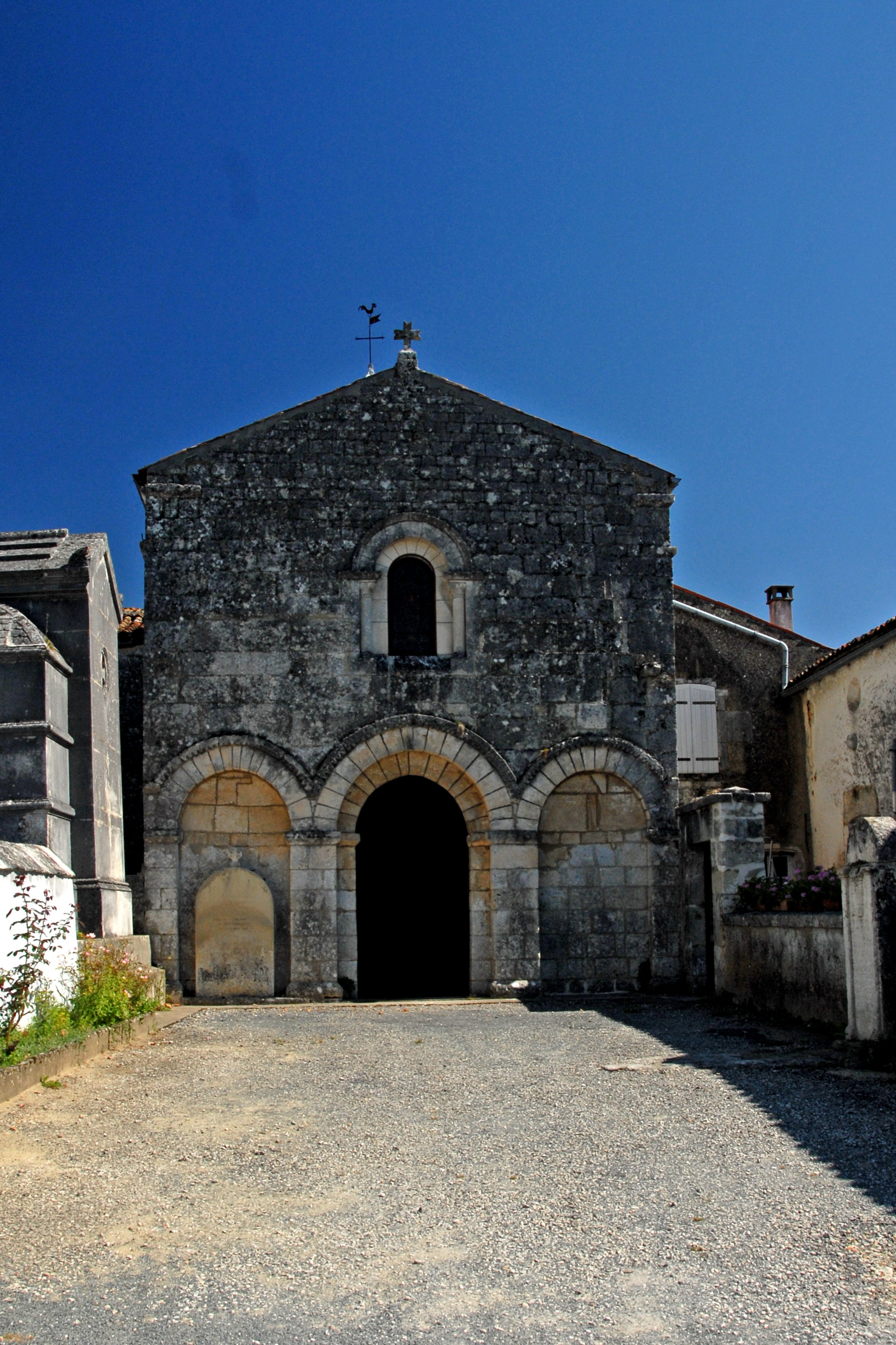 Saint-Bris-de-Bois,Fassade